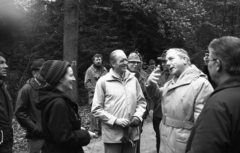 Bundespräsident Karl Carstens Wanderung